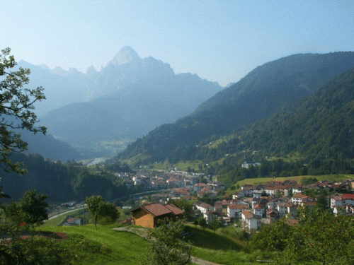 Foto tratta dal sito di proprietà di Teon Dario di Paularo protetta da copyright morale: chiunque può diffondere testi e immagini del sito citandone la fonte